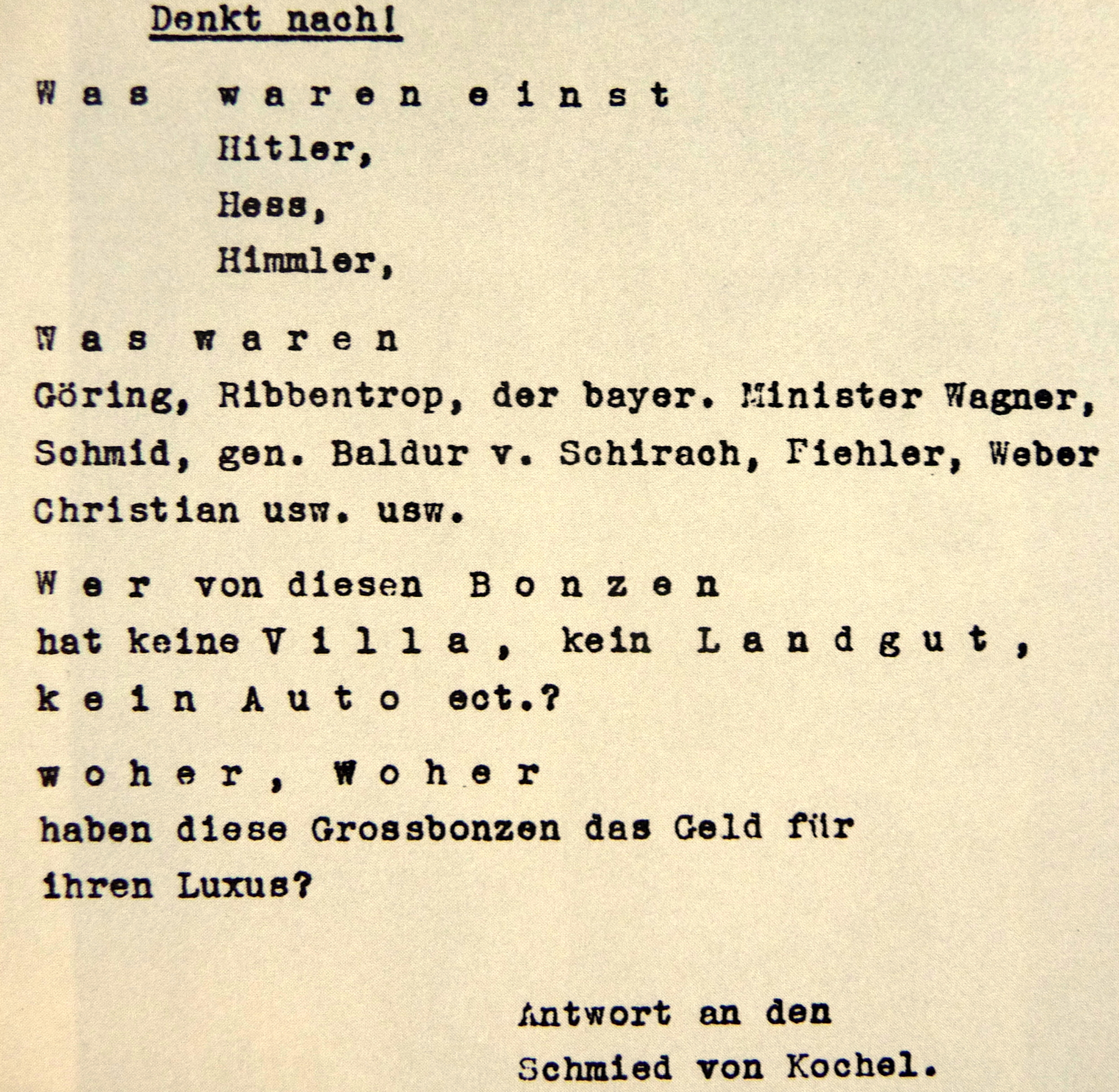 Reißerischer Auszug aus einem Flugblatt der monarchistisch-separatistischen Widerstandskämpfer um Heinrich Weiß.